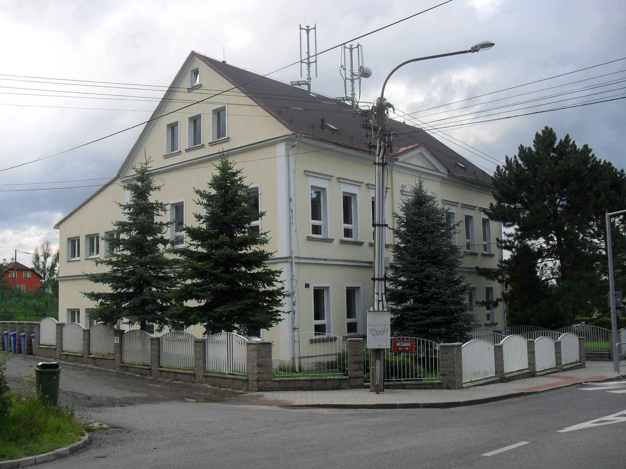 ZŠ Ostašov, Liberec